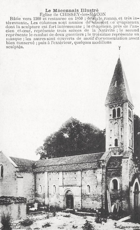 Église de Chissey-lès-Mâcon, bâtie vers 1100 et restaurée en 1850. Style roman.